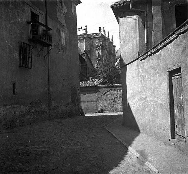 Antigua fotografía del Corral de San Guisán esquina con la Calle Descalzos. A la izquierda, el palacio del marqués de San Isidro, con la basílica de San Isidoro al fondo. Sabemos que es el palacio del marqués de San Isidro si seguimos las indicaciones geográficas dadas aqui: [1]